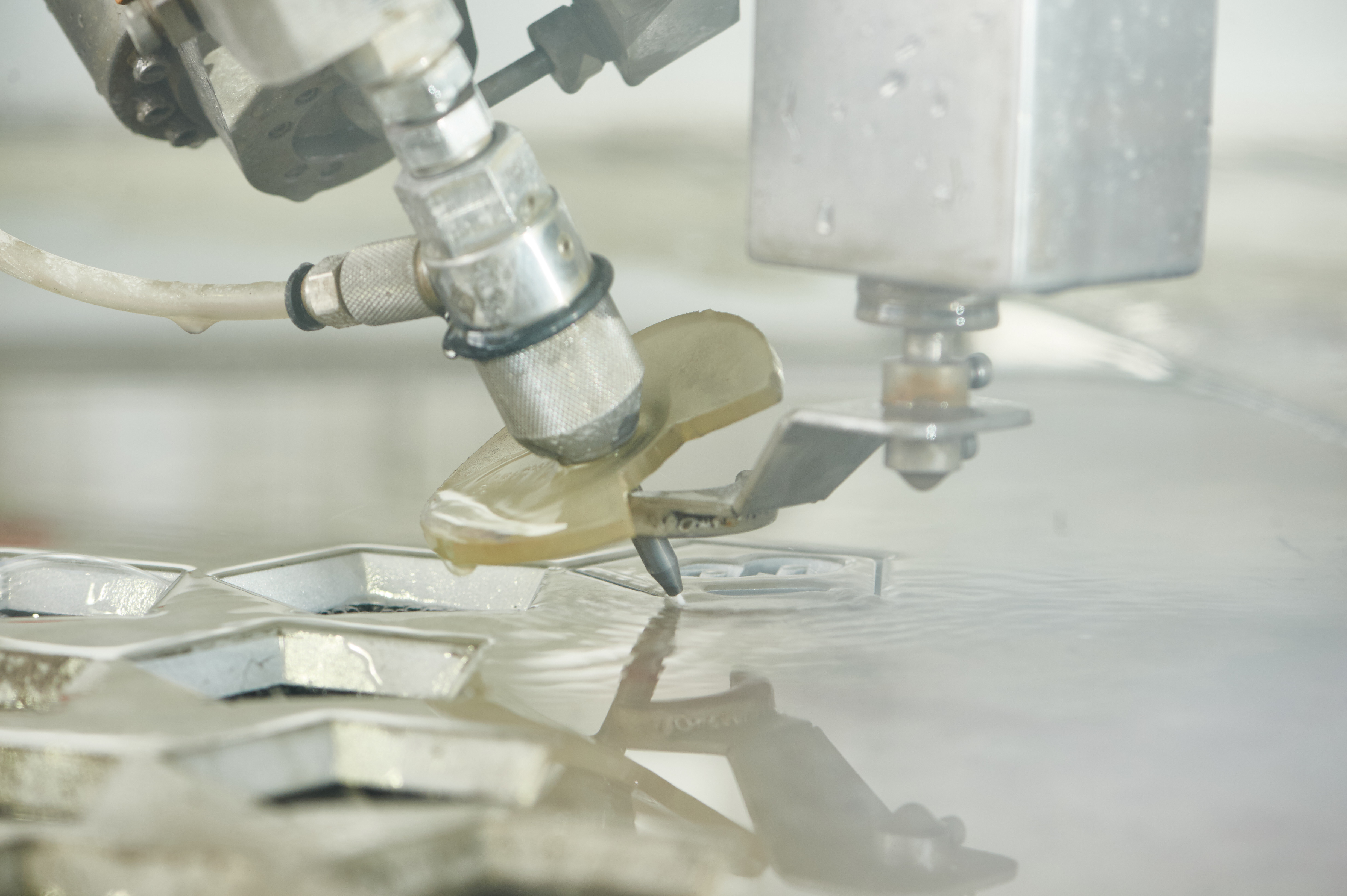 На фото режущая голова, одна из важнейших составляющих станка для гидроабразивной резки.